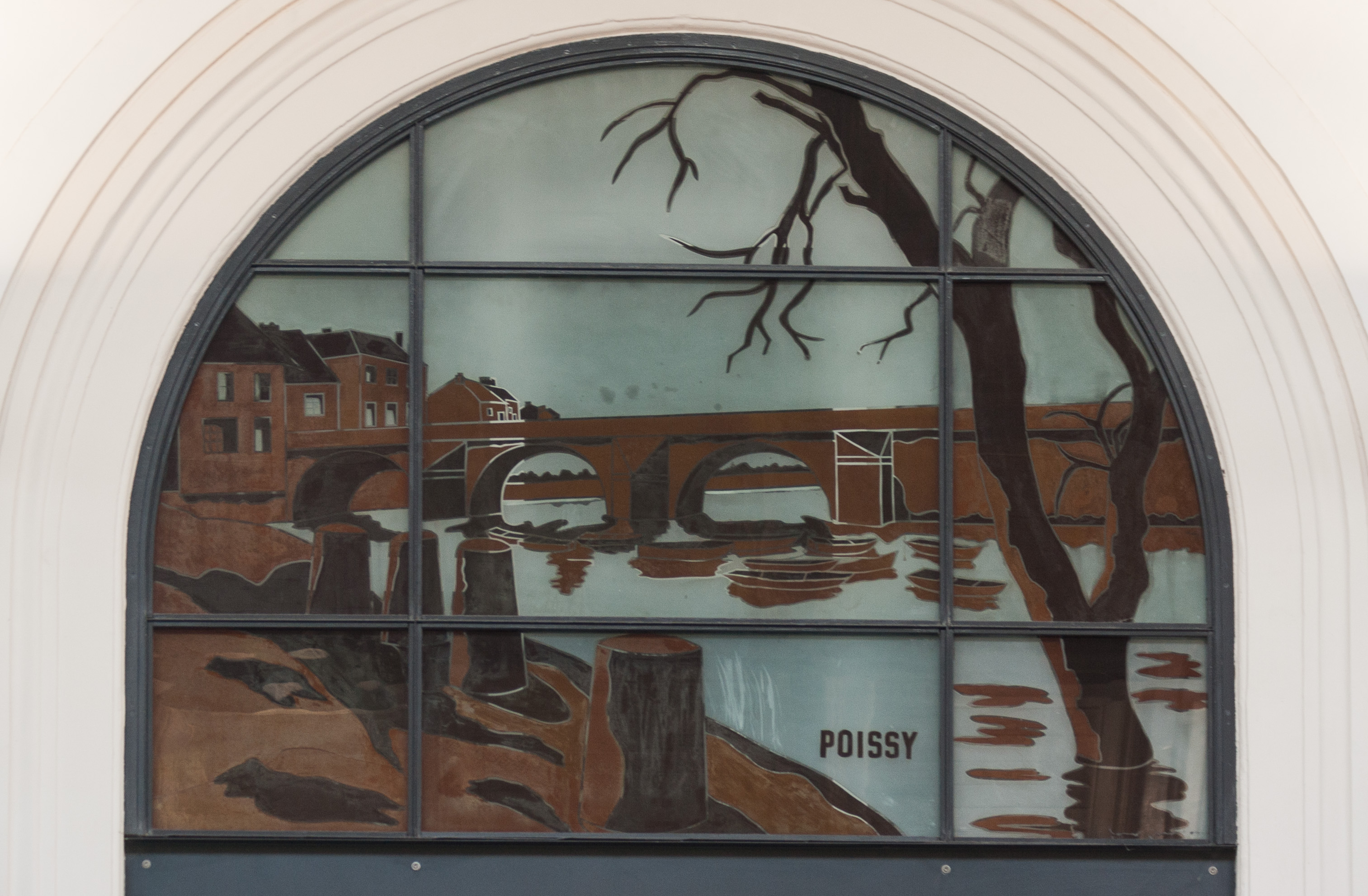 Gare de Paris Saint-Lazare - Ancien pont de Poissy sur les verrières peintes de la salle des pas-perdues, réalisées en 1927 d'après les dessins de Charles Sarteur (1874-1933), restaurées en 2011.